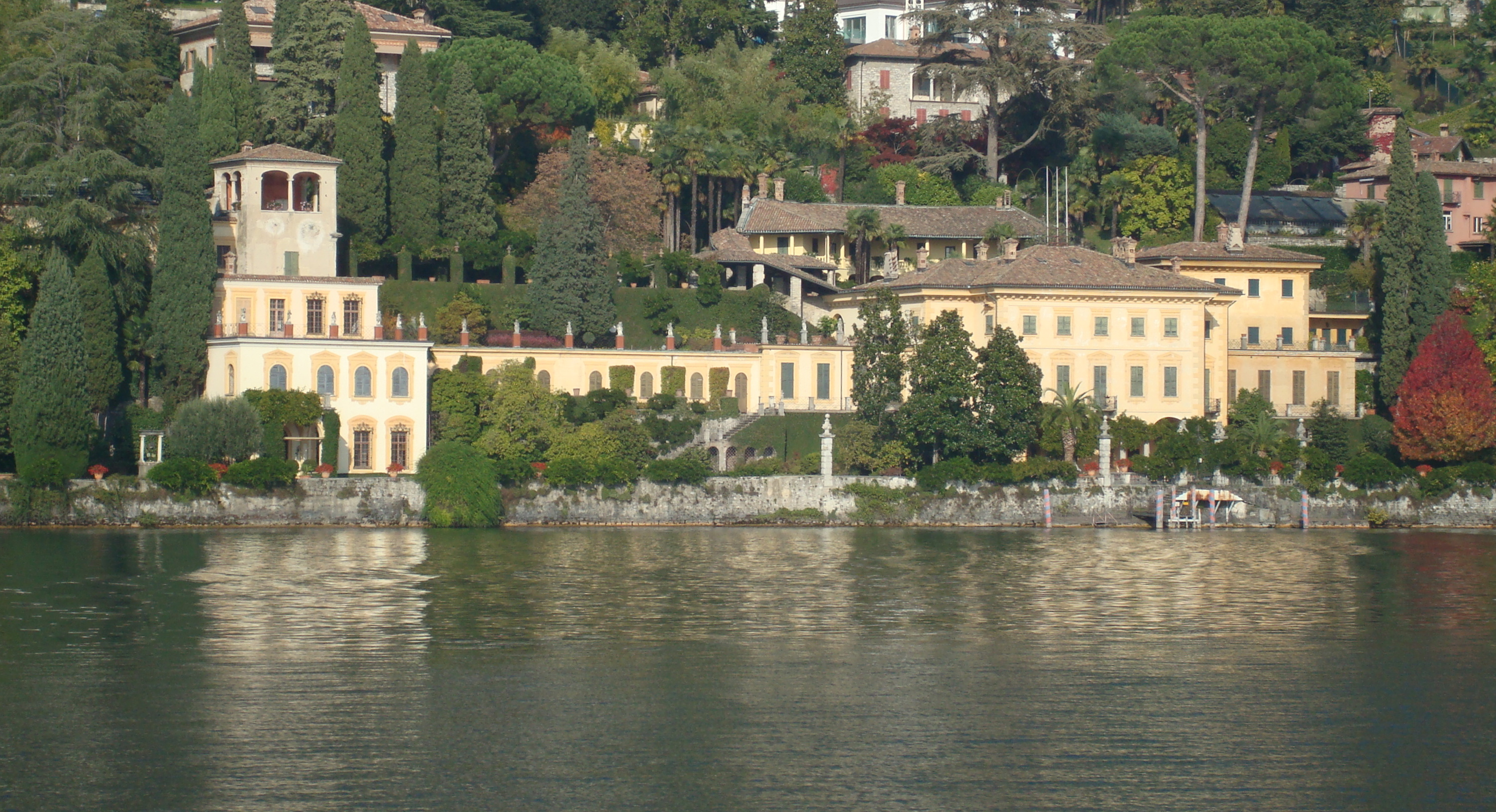 Villa Favorita Lugano. Construite en 1660, à Castagnola, par les Beroldingen (baillis de Lugano), la demeure a été achetée en 1932 par le père du baron von Thyssen.